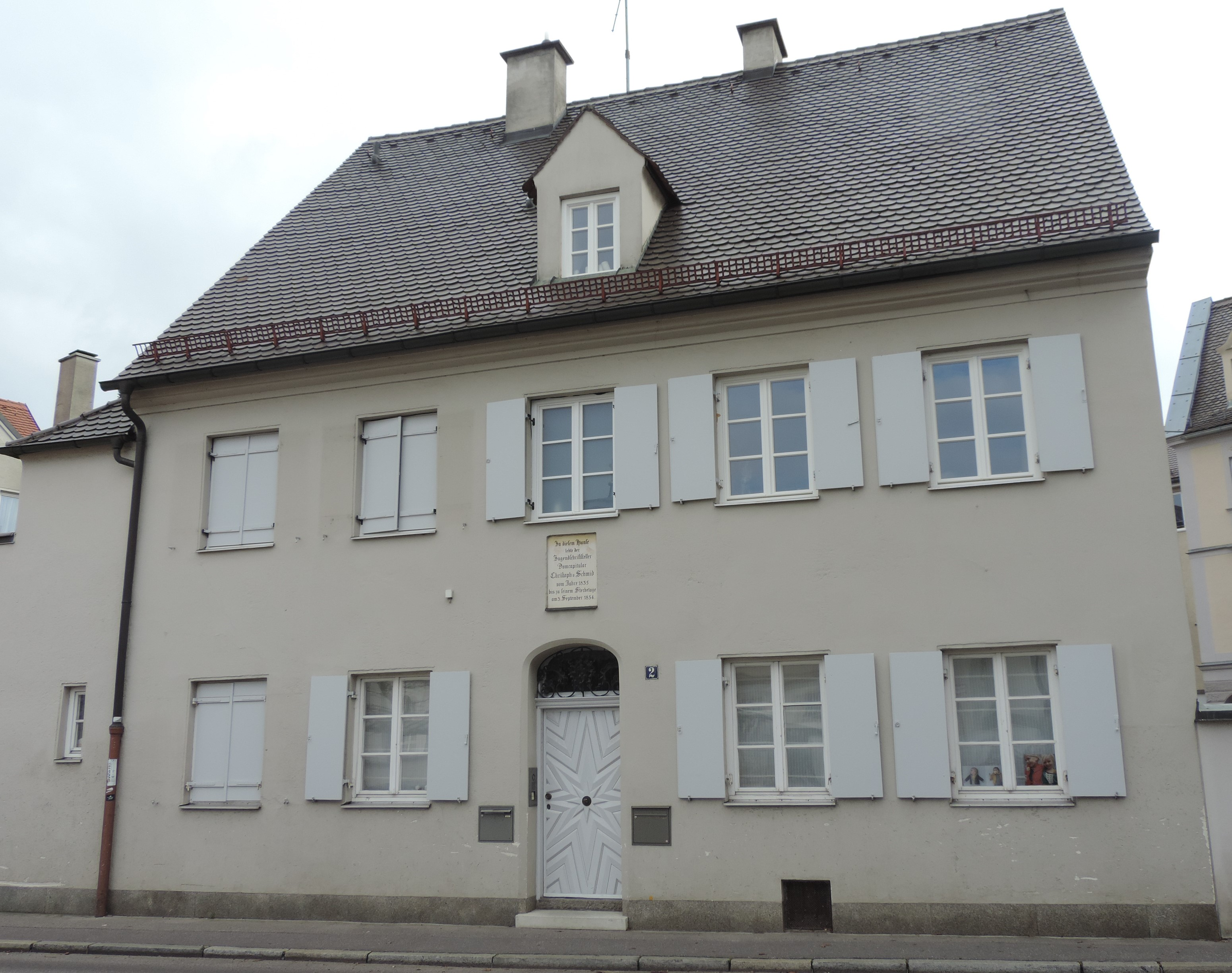 Letzte Wohnstätte von Christoph von Schmid in Augsburg